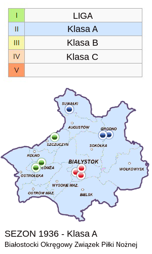 Jagiellonia w sezonie 1936 - mapa